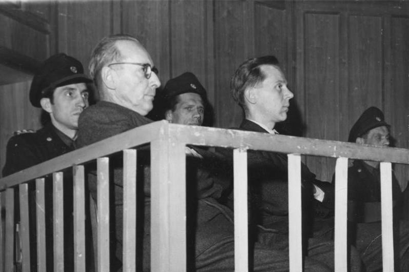 ADN-ZB/ Illus- Heilig Beginn des Dessauer Millionenschieber-Prozesses. Am 24. April 1950 begann vor dem ersten Strafsenat des Obersten Gerichts der Deutschen Demokratischen Republik der Prozess gegen den ehemaligen Minister für Arbeit und Sozialwesen von Sachsen-Anhalt, Herwegen, und seine Mitangeklagten. Die Verhandlungen, die unter starker Teilnahme der werktätigen Bevölkerung im Landestheater Dessau stattfinden werden von der Vizepräsidentin des Obersten Gerichtshofes, Hilde Benjamin, geführt. Dr. Leo Herwegen, ehem. Minister für Arbeit und Sozialwesen in Sachsen Anhalt; Prof. Dr. Willi Brundert, ehem. stellvertretender Wirtschaftsminister von Sachsen-Anhalt; Dipl.-Ing. Hermann Müller, ehem. Direktor der Deutschen Continentalen Gasgesellschaft in Dessau; Dr. Leopold Kaatz, ehem. Direktor der Dessauer Zuckerraffinerie und Präsident der Industrie und Handelskammer in Dessau; Ernst Simon, ehem. Landgerichtsdirektor in Dessau und später juristischer Hilfsarbeiter der Deutschen Continentalen Gasgesellschaft; Paul Heil, ehem. Rechtsanwalt und Notar; Ernst Pauli, ehem. Wirtschaftsbeautragter beim Oberbürgermeister der Stadt Dessau und gleichzeitig Leiter der Abteilung Industrie bei der Industrie und Handelskammer in Dessau; Heinrich Scharf, ehem. Mitglied des Direktoriums der Landeskreditbank Sachsen-Anhalt, werden angeklagt, die Überführung des Konzerns der Deutschen Continentalen Gasgesellschaft in das Eigentum des Deutschen Volkes planmäßig sabotiert zu haben. Gegen den ehem. Direktor der Deutsche Continentalen Gasgesellschaft Friedrich Methfessel, der sich durch die Flucht nach Westdeutschland vorläufig der Verantwortung entzogen hat, wird in Abwesenheit verhandelt. UBz: Die Angeklagten Herwegen (links) und Dr. Brundert (rechts) 01.05.50 6318-50